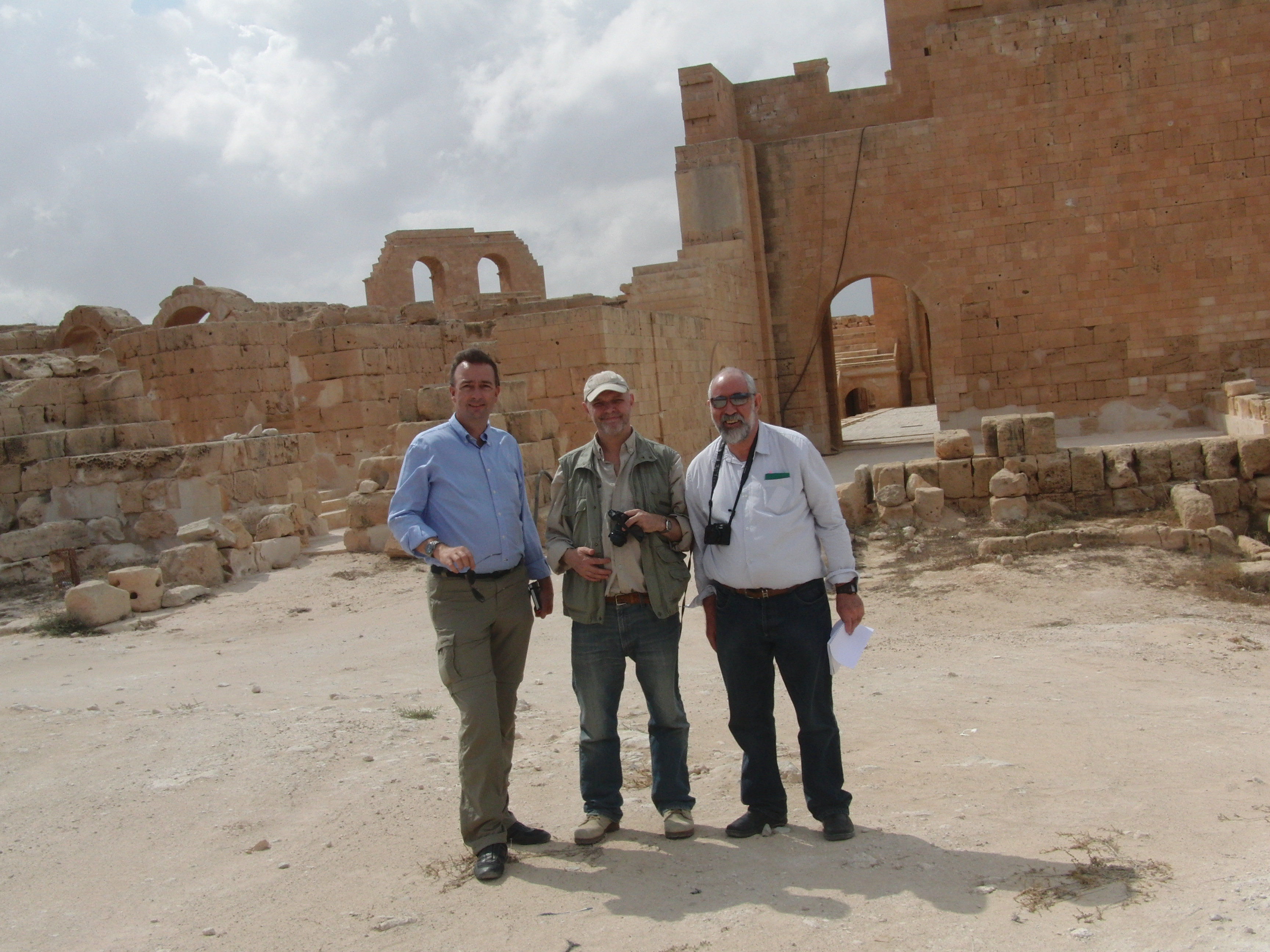 Core Team, Blue Shield Fact Finding Mission Libyen: Habsburg-Lothringen, Kila, Walda